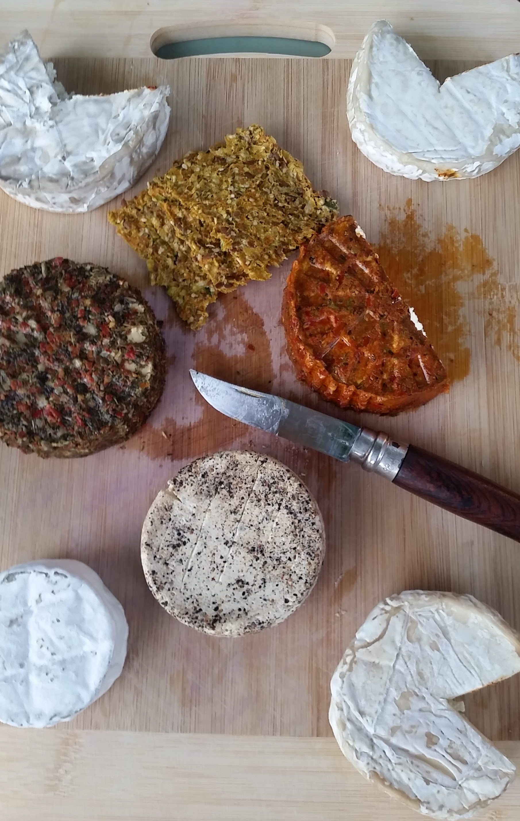 Plateaux de fromages végans artisanaux